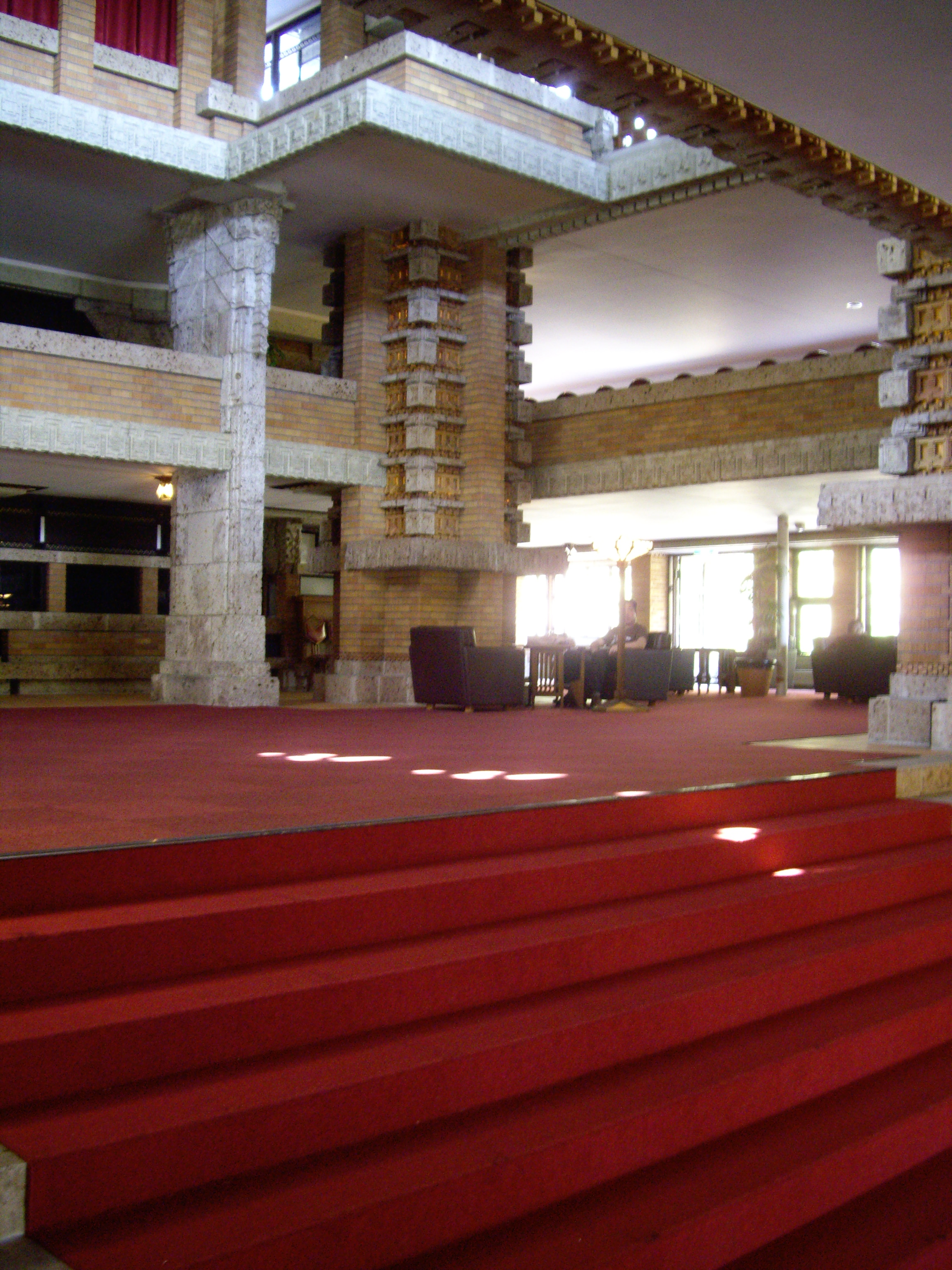 Meiji Mura